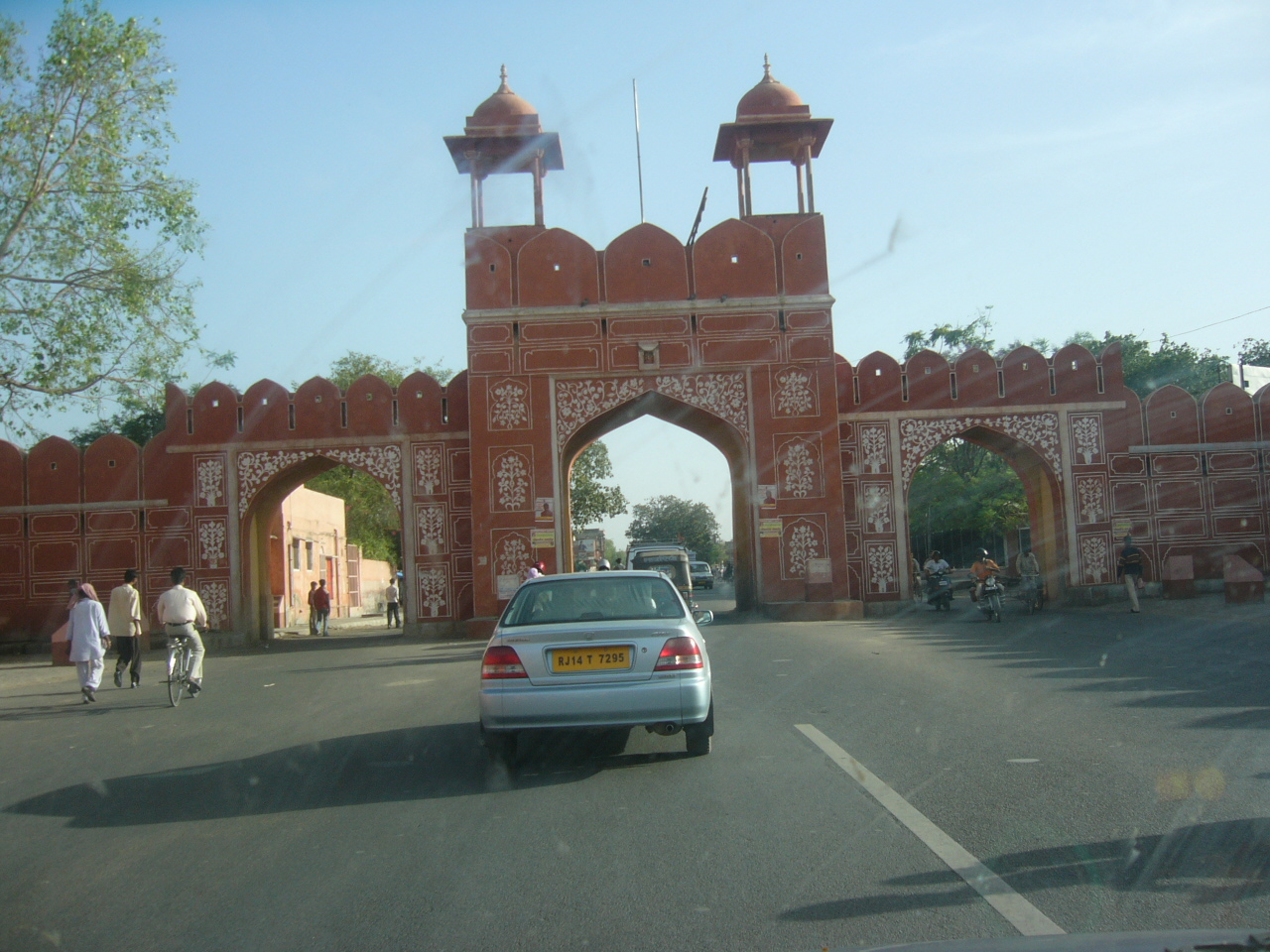 Jaipur Rajasthan India